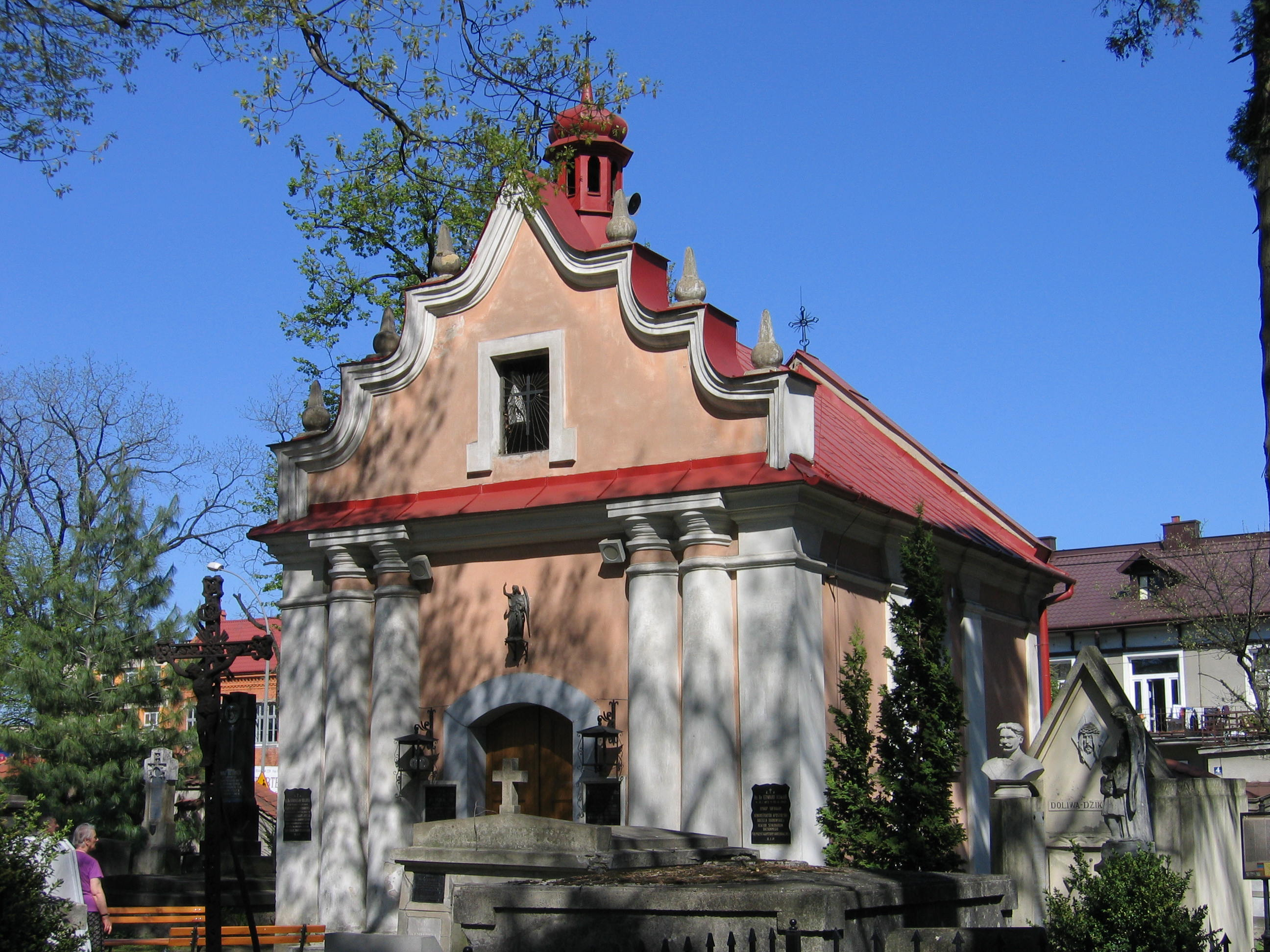 Tarnów - Stary Cmentarz, kaplica Radzikowskich "św. Józefa" (zabytek nr kl.V-114/15/57 z 30.09.1957; A-127a z 11.06.1977, dec.: A-125 z 18.06.1977)